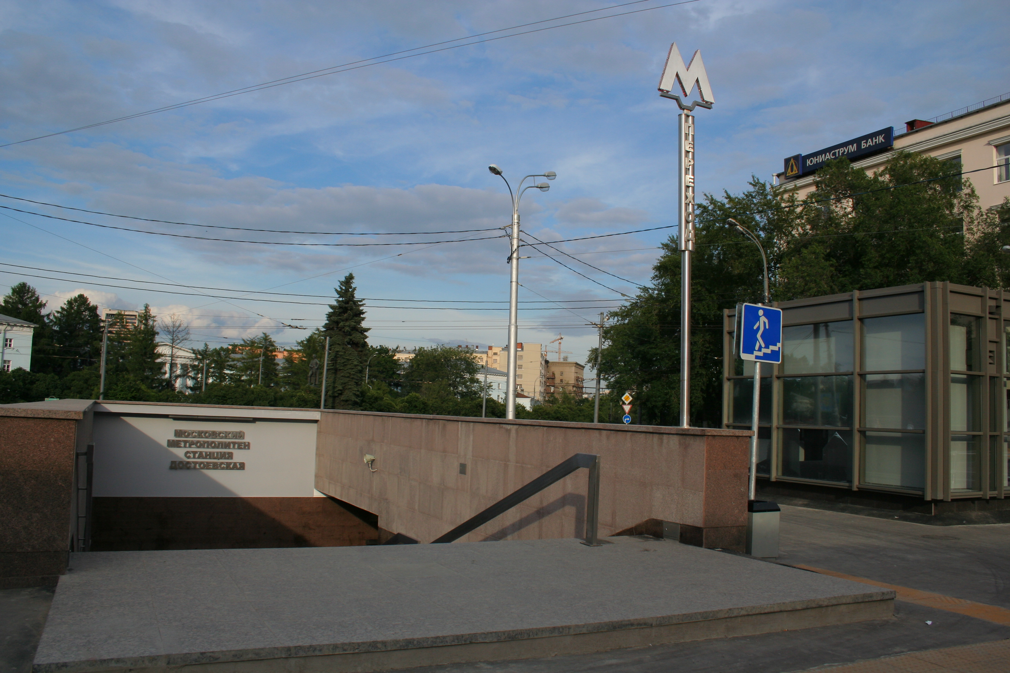 Station Dostojewskaja der Moskauer Metro am Tag der Eröffnung.